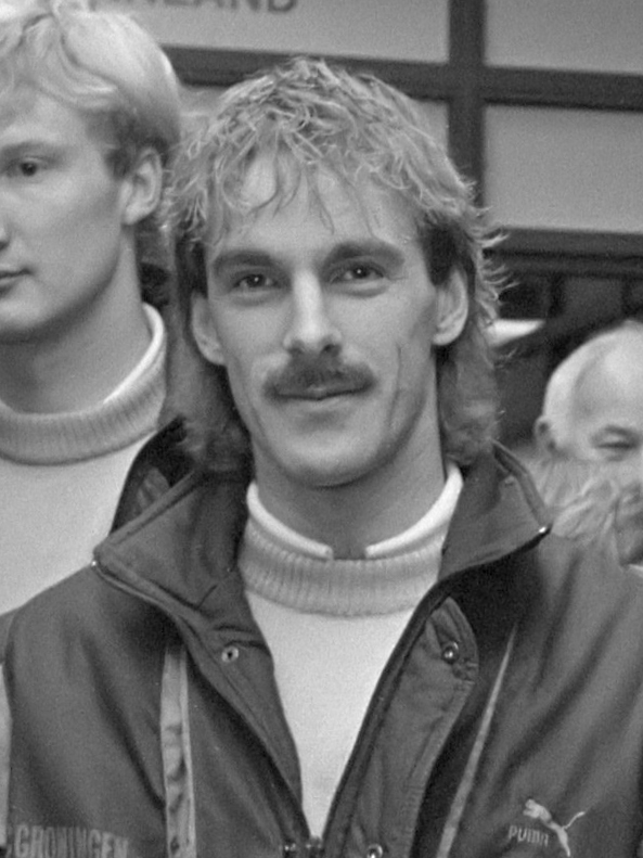 Vertrek FC Groningen naar Portugal vanaf vliegveld Eelde voor Europa Cup III wedstrijd; R. Eykelkamp , R. van de Berg , E.O. Riekerink , trainer Jacobs, Houtman 8 december 1986